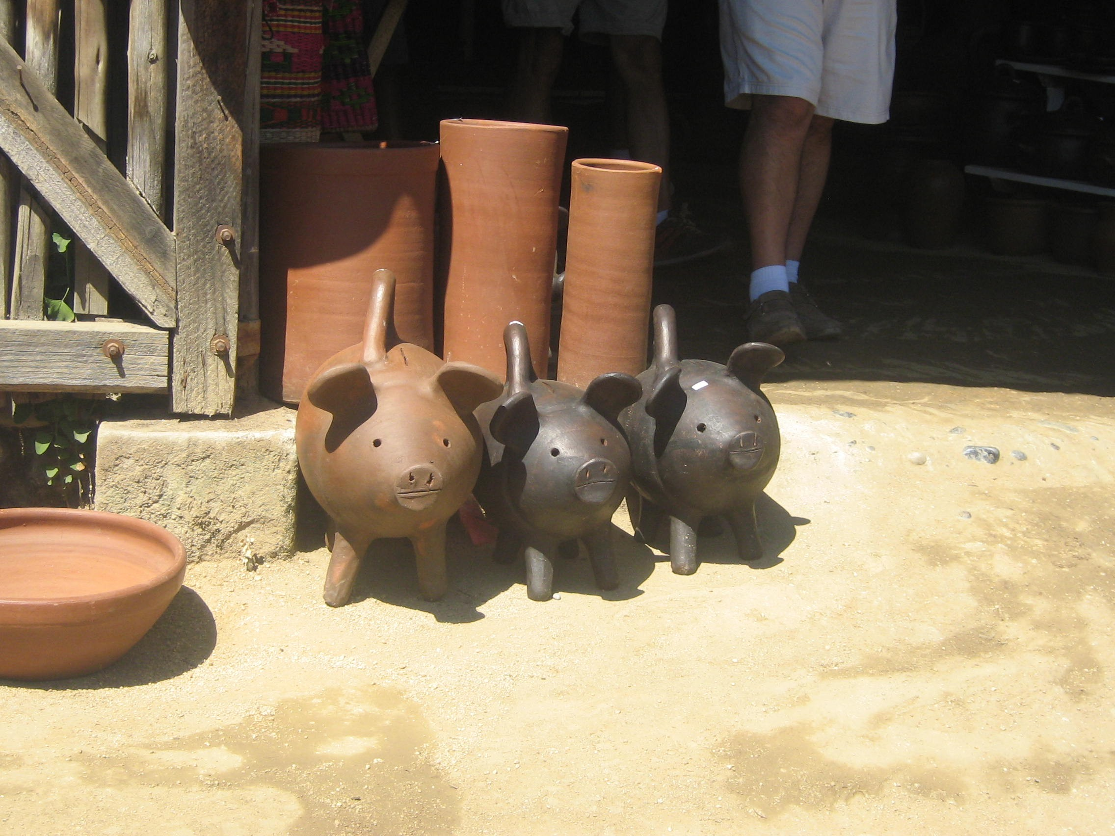 Chanchito de greda, Pomaire (Chile)